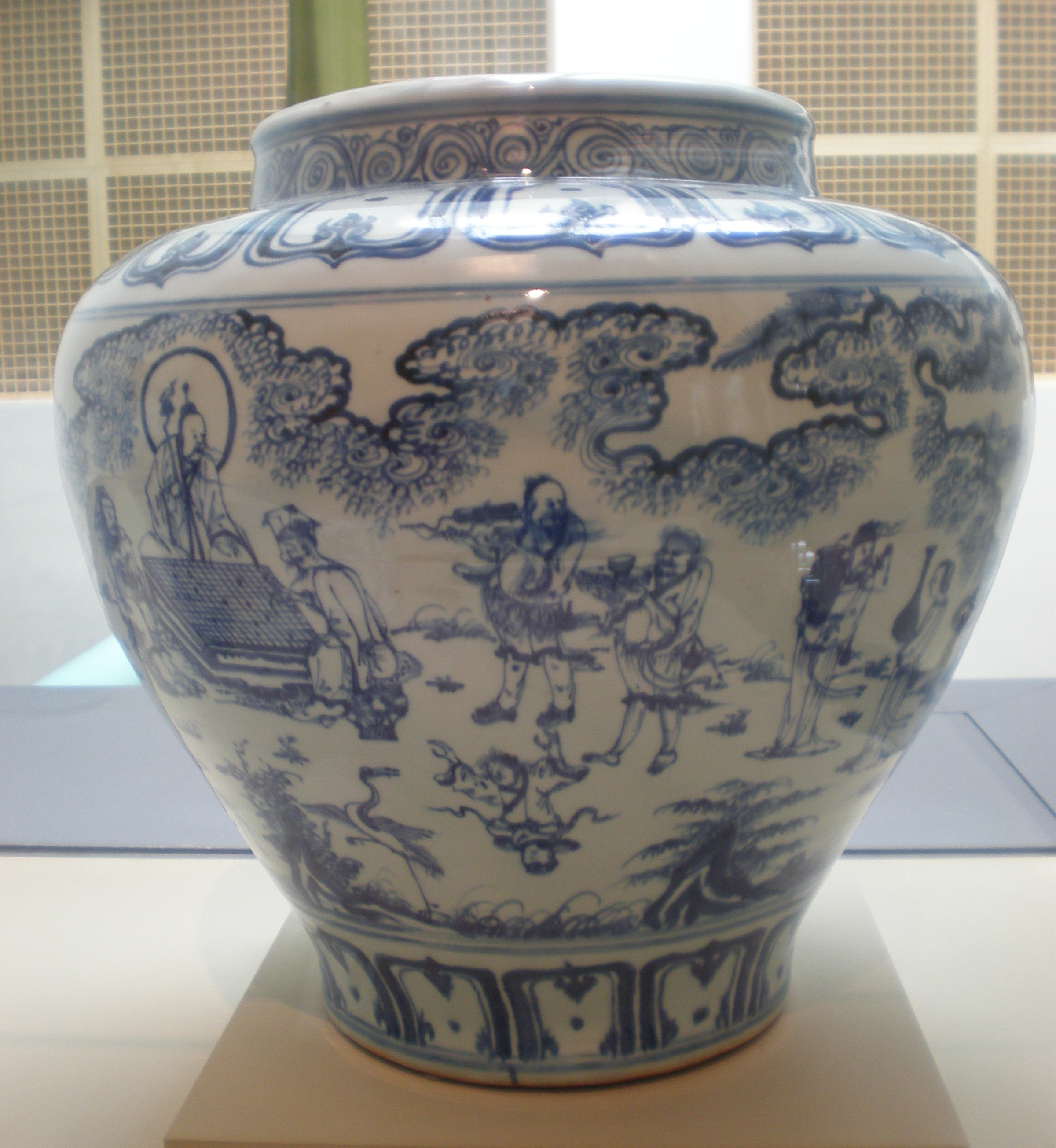 Porcelain vase with scholars going to a gathering, reign of the Tianshun emperor (1458-1464), Ming Dynasty, from Jingdezhen, Jiangxi Province. On display at the Asian Art Museum in San Francisco, California. B60P86 Anonym: Porzellanvase mit Gelehrten, die zu einer Versammlung gehen. Regierungszeit des Jingtai-Kaisers (regiert 1449-1457) oder Tianshun-Kaisers (regiert 1457-1464), Ming-Dynastie (1368-1644). Aus der Stadt Jingdezhen, Provinz Jiangxi, China. Porzellan bemalt mit Kobaltblau unter der transparenten Glasur (Unterglasurblau). Asiatisches Museum San Francisco, Kalifornien.